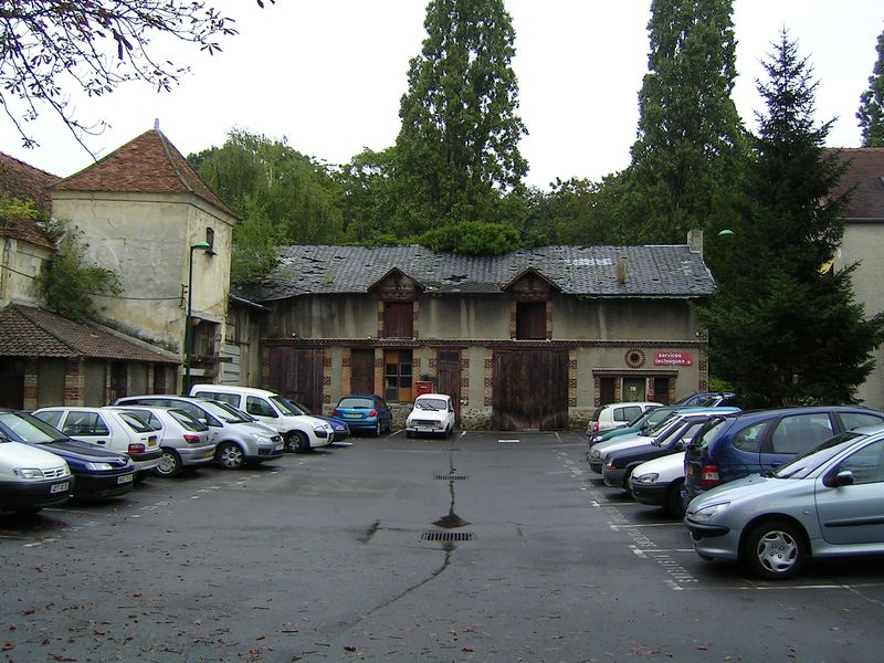 La Ferme de la Fossée (dite Hamelin) Photo personnelle (own work) de Marianna